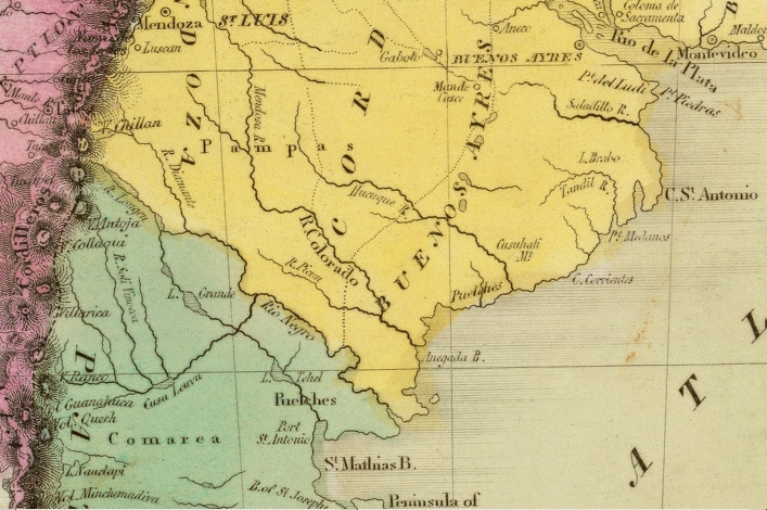 Detalle de un mapa de las Provincias Unidas en 1833